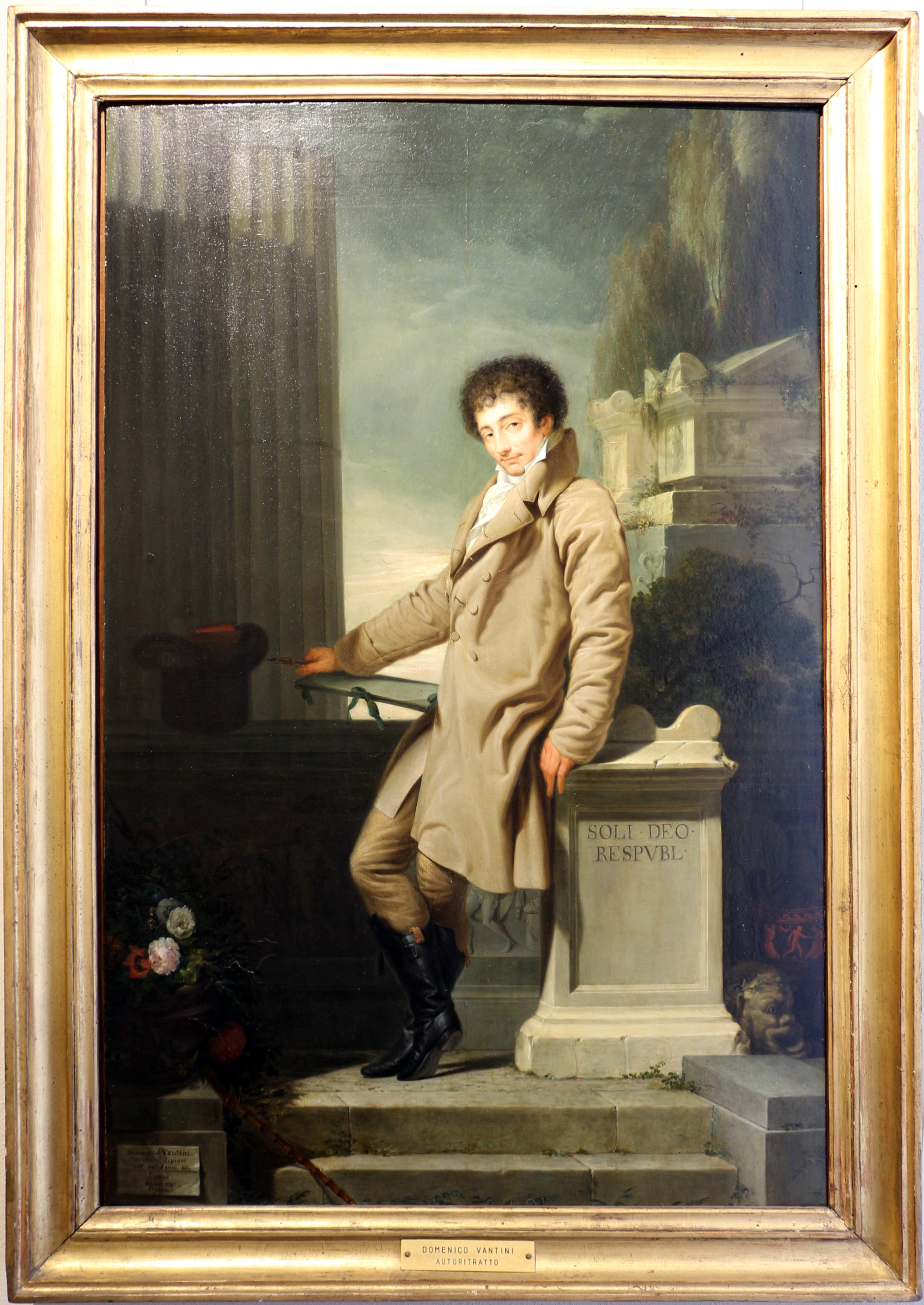 Paintings in the Civica galleria d'arte moderna (Milan) This is a photo of a monument which is part of cultural heritage of Italy.